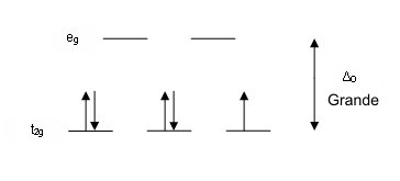 Diagrama se la separación energética en un complejo de bajo espín